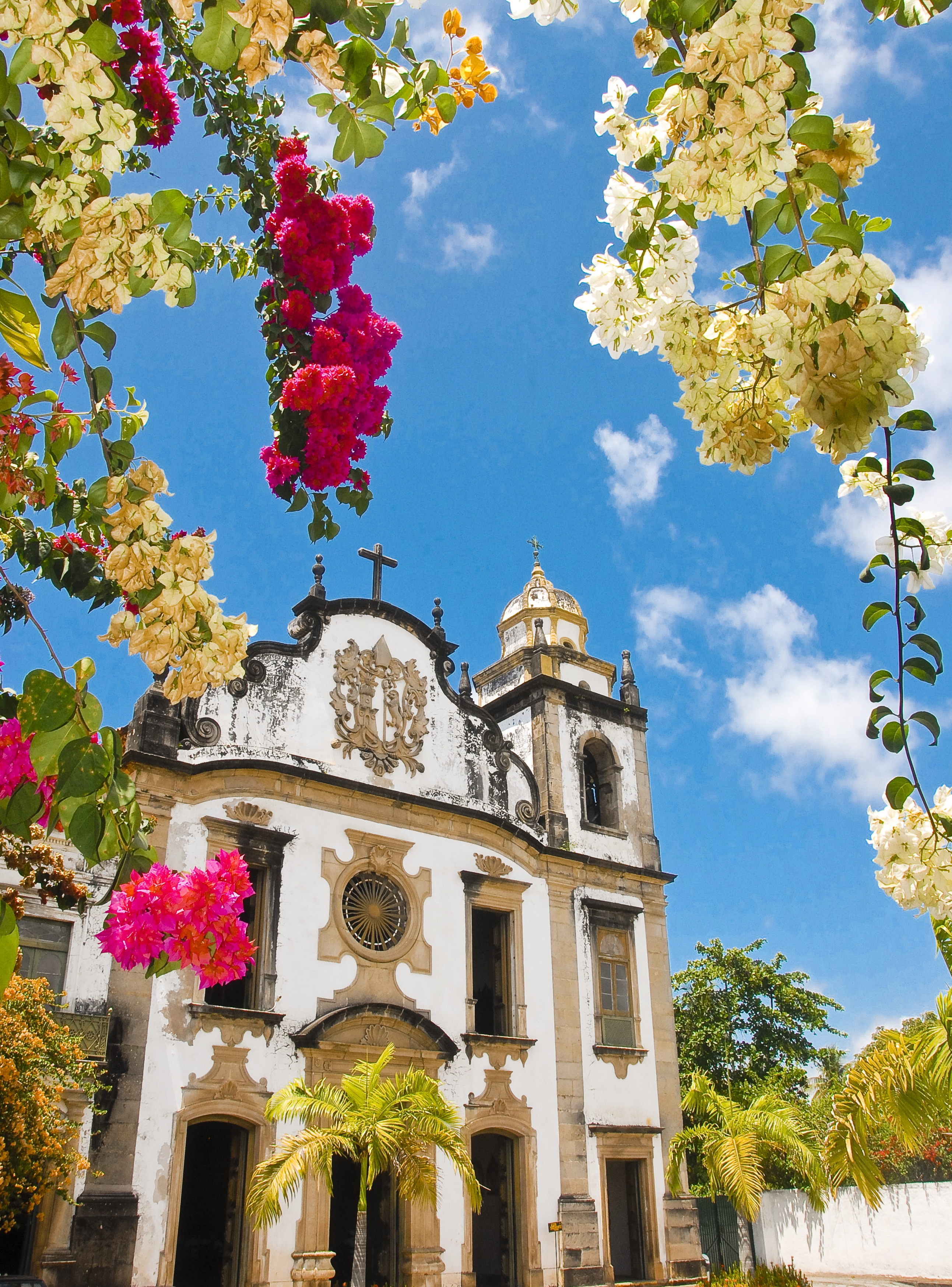 Foto: Passarinho/Pref.Olinda